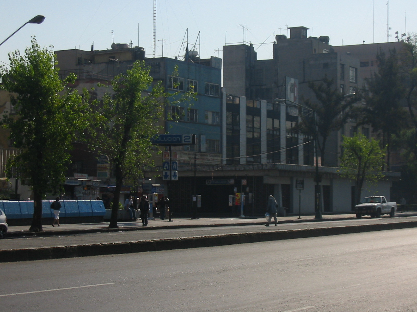 Entrance to Metro Revolucion in Mexico City